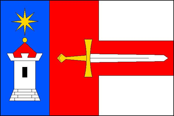 Vlajka obce Strašín